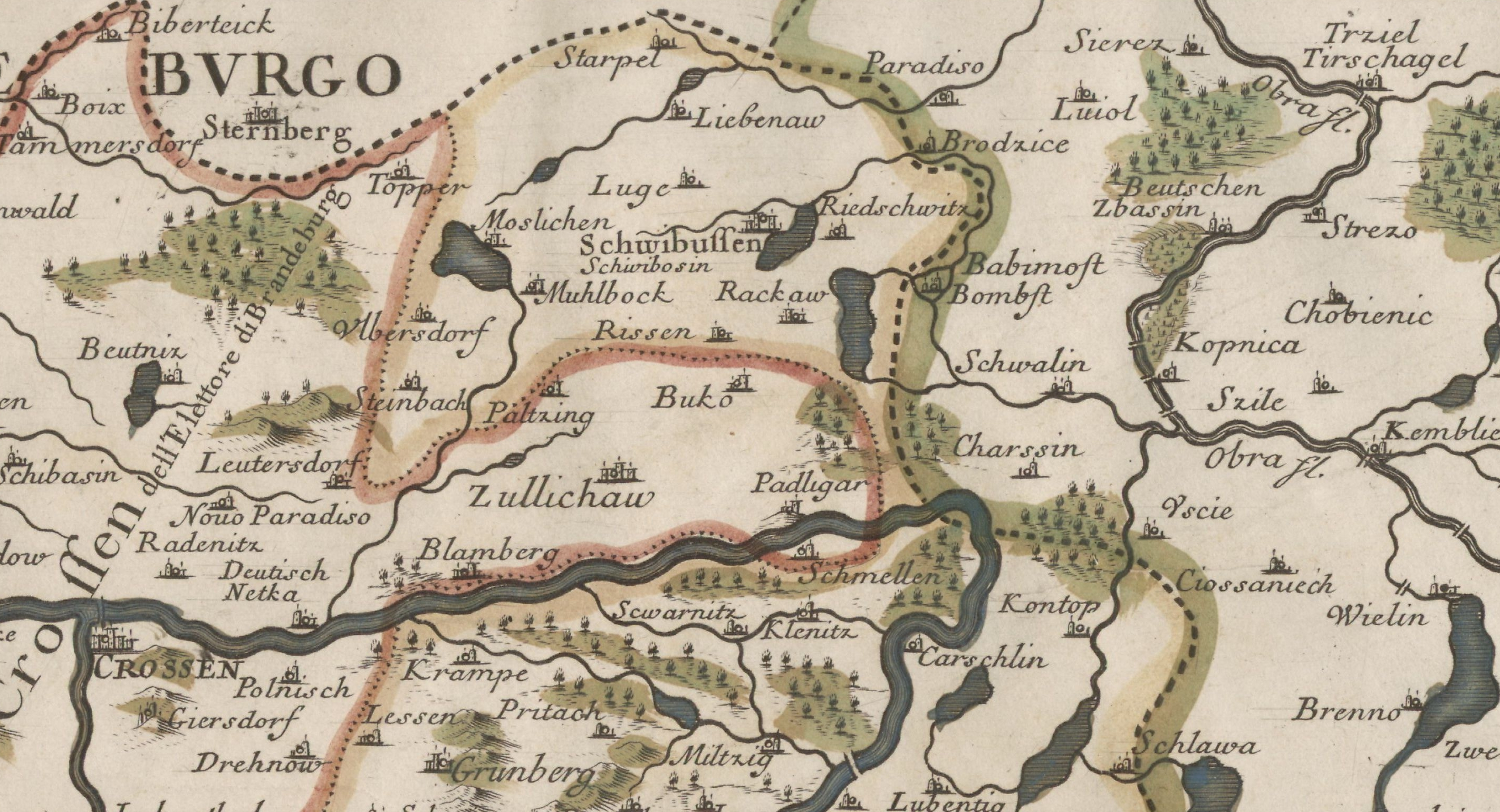 Enklawa Świebodzińska na mapie Parte inferiore del Ducato di Silesia 1692 autorstwa Giacomo Cantelli